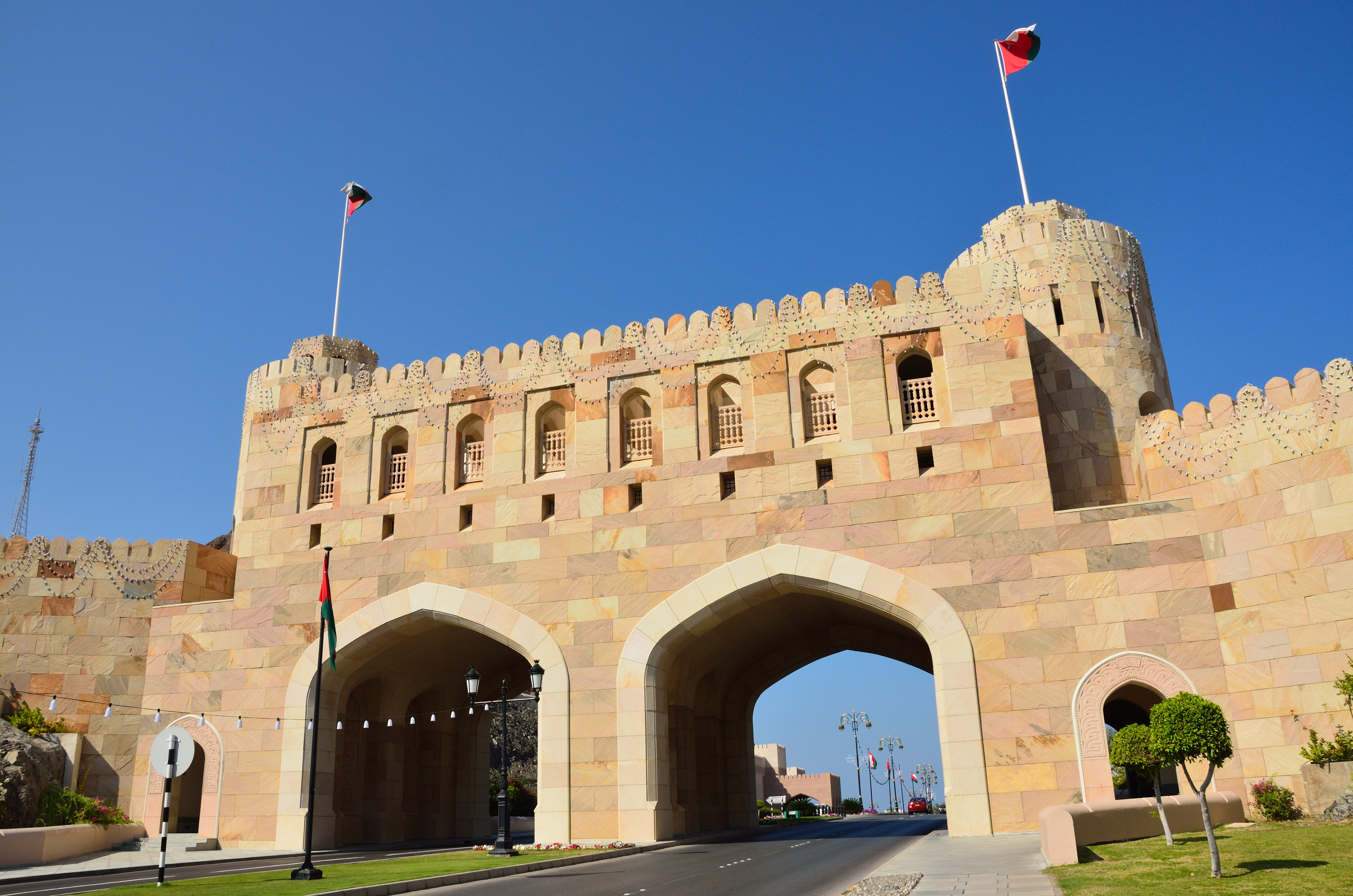 Muscat Gate Museum (Oman)